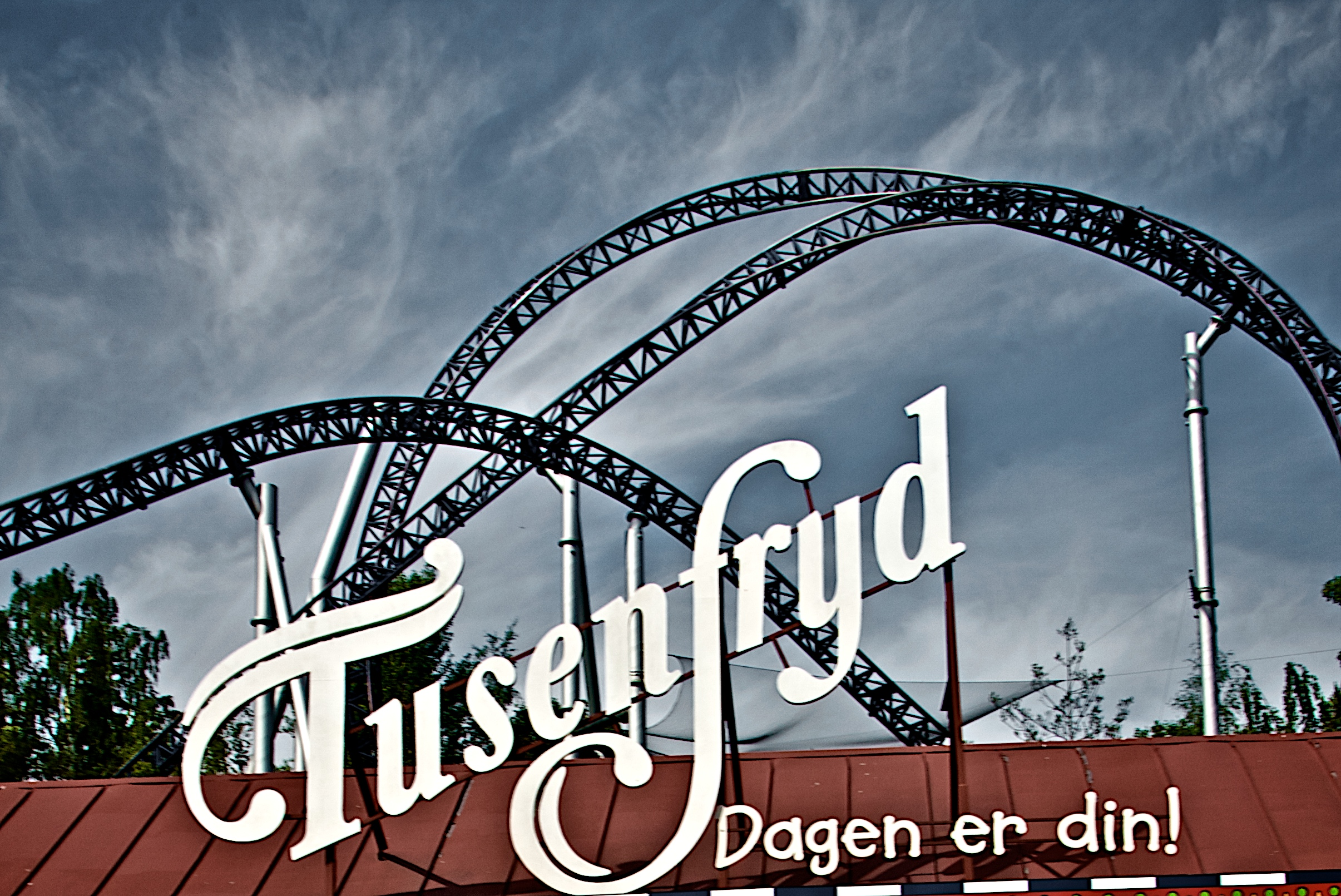 Tusenfryd